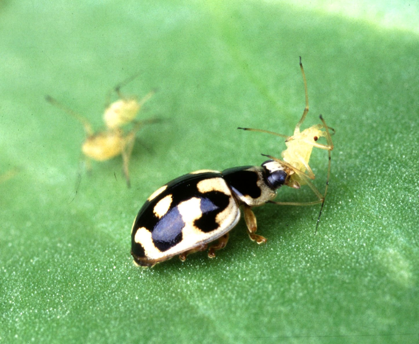 A P-14 lady beetle (Propylea quatuordecimpunctata (Linnaeus, 1758)) devours a pea aphid.